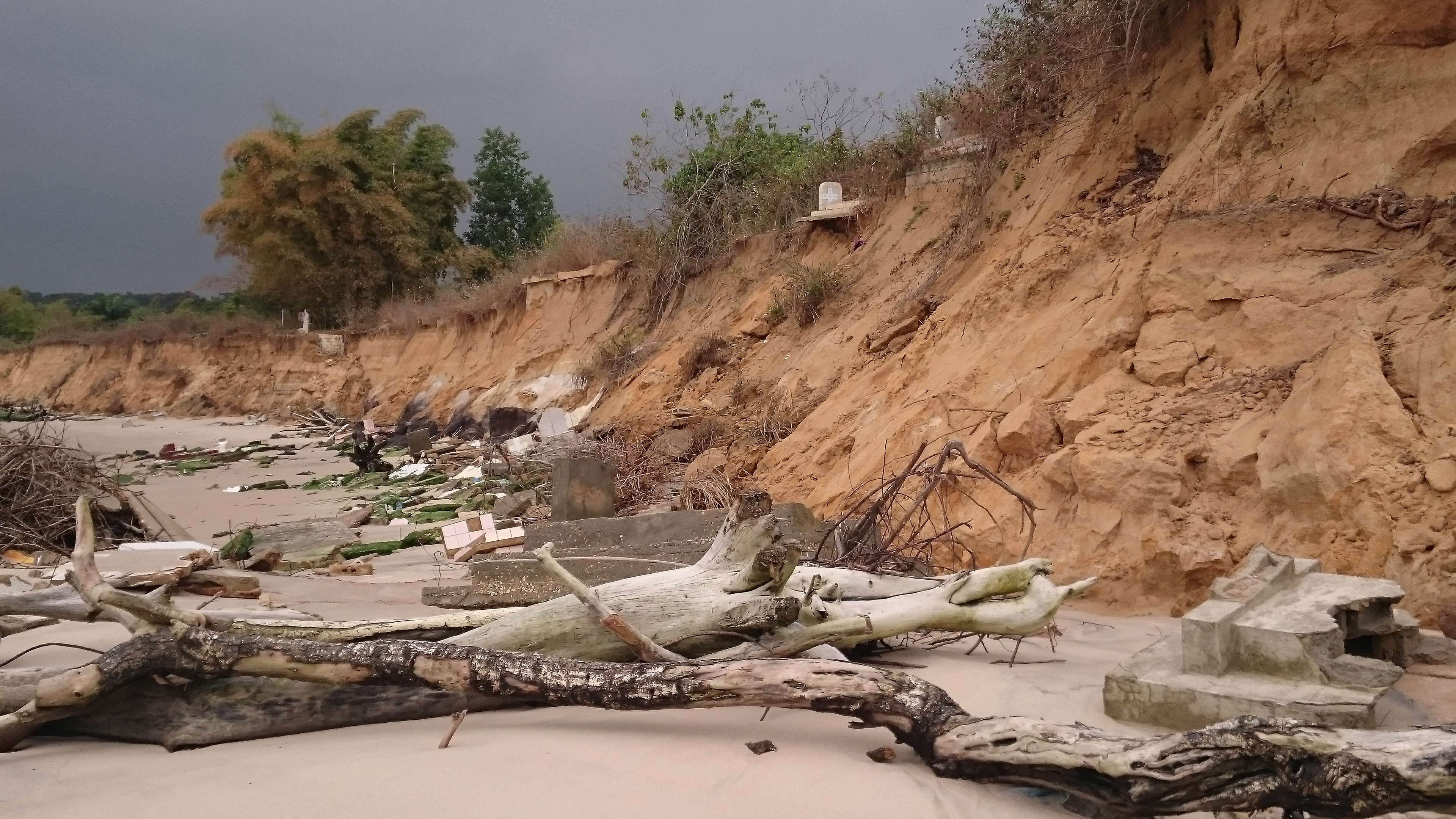 L'érosion de la côte à Pointe-Noire en République du Congo entraîne la disparition du cimetière. This is an image with the theme "Africa on the Move or Transport" from: Congo